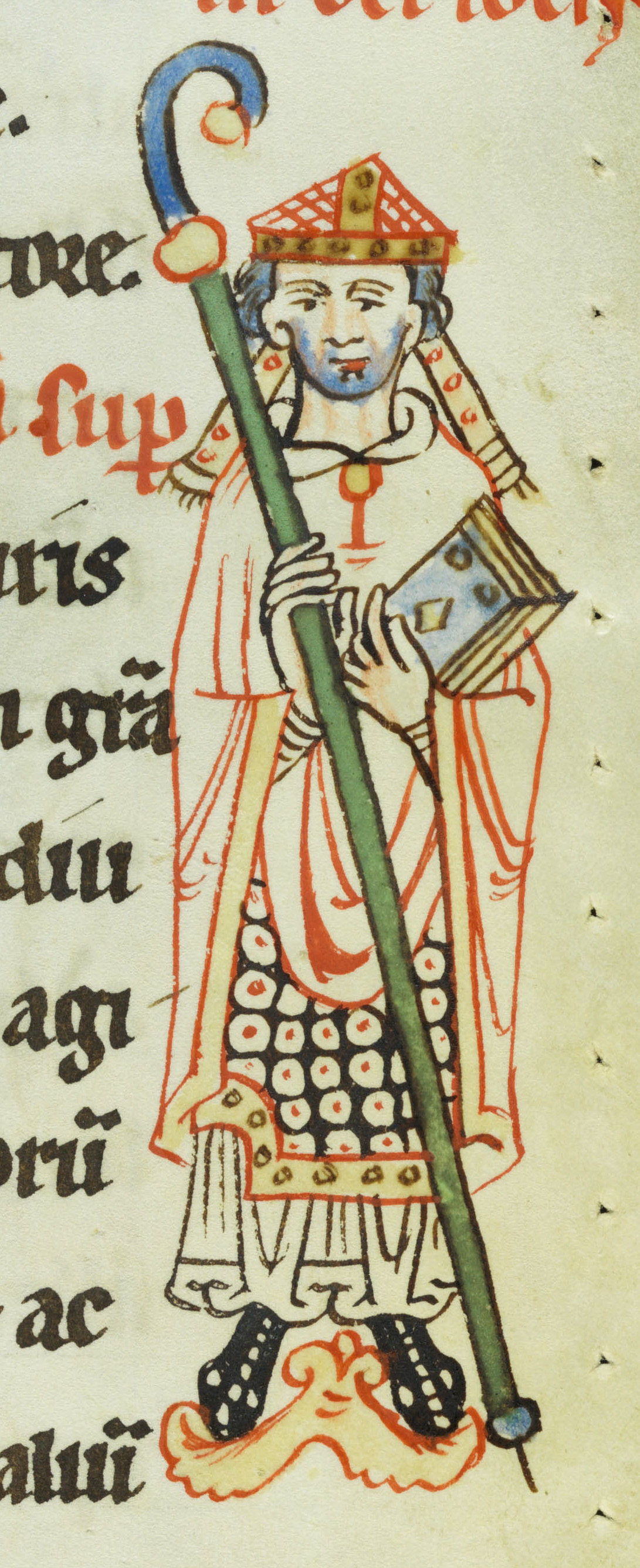 Acta Sancti Petri in Augia; St. Gallen, Kantonsbibliothek, Vadianische Sammlung, VadSlg Ms. 321, S. 59, Bischof Hermann I. von Arbon